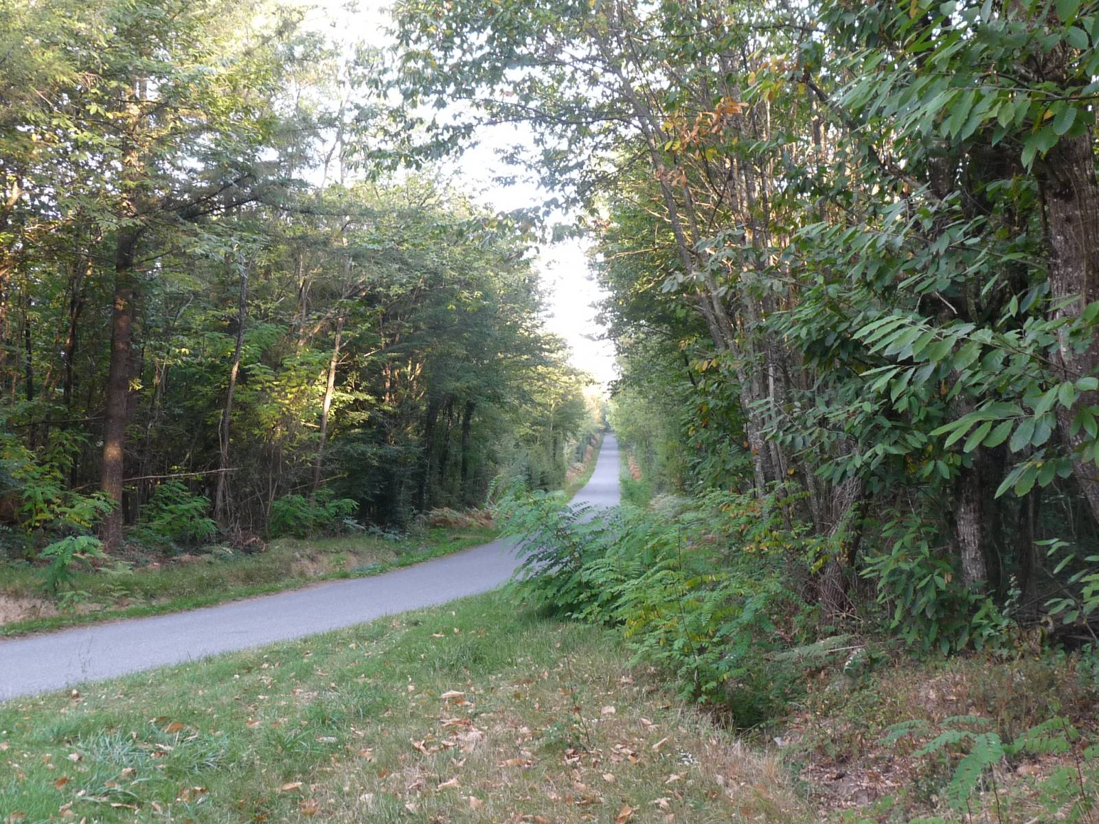 forêt de Quatre Vaux, Charente, France; sur la D.36